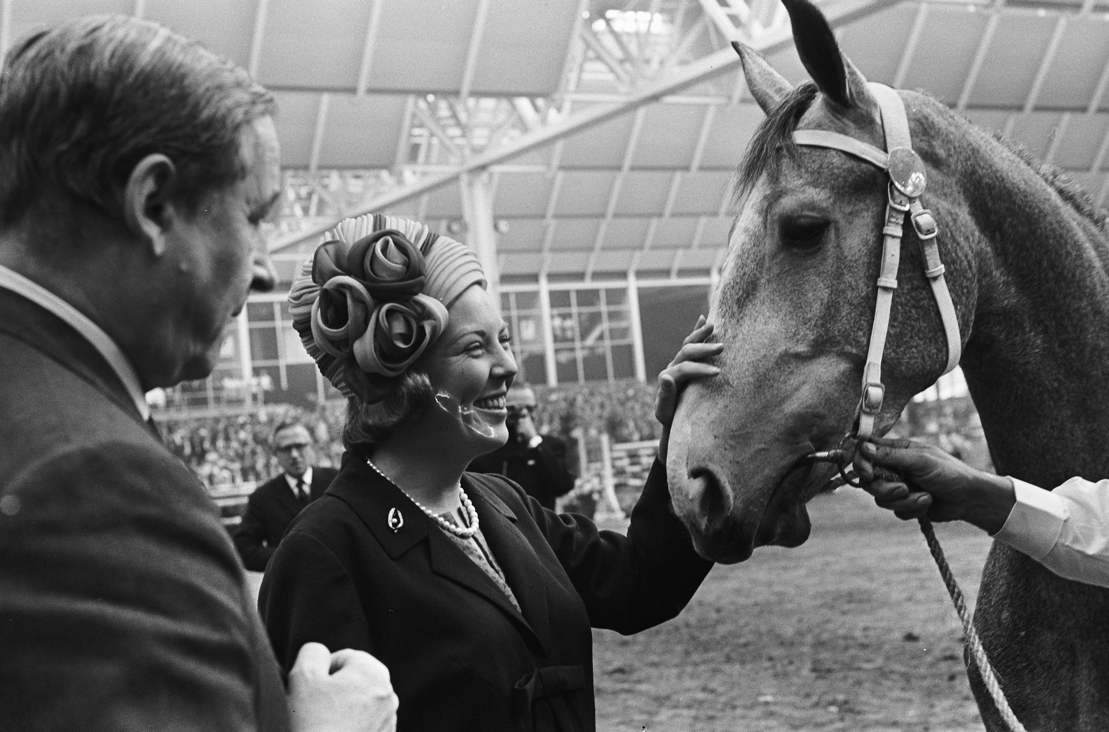 Collectie / Archief : Fotocollectie Anefo Reportage / Serie : [ onbekend ] Beschrijving : Prins Bernhard en Prinses Beatrix brachten bezoek aan Irenehal in Utrecht (landbouwtuig paardfokkerij), Prinses Beatrix met haar nieuwe paard Comtesse / Datum : 25 september 1964 Locatie : Utrecht Trefwoorden : bezoeken Persoonsnaam : Beatrix, prinses, Bernhard, prins, Comtesse Instellingsnaam : Irenehal Fotograaf : Pot, Harry / Anefo Auteursrechthebbende : Nationaal Archief Materiaalsoort : Negatief (zwart/wit) Nummer archiefinventaris : bekijk toegang 2.24.01.05 Bestanddeelnummer : 916-9231